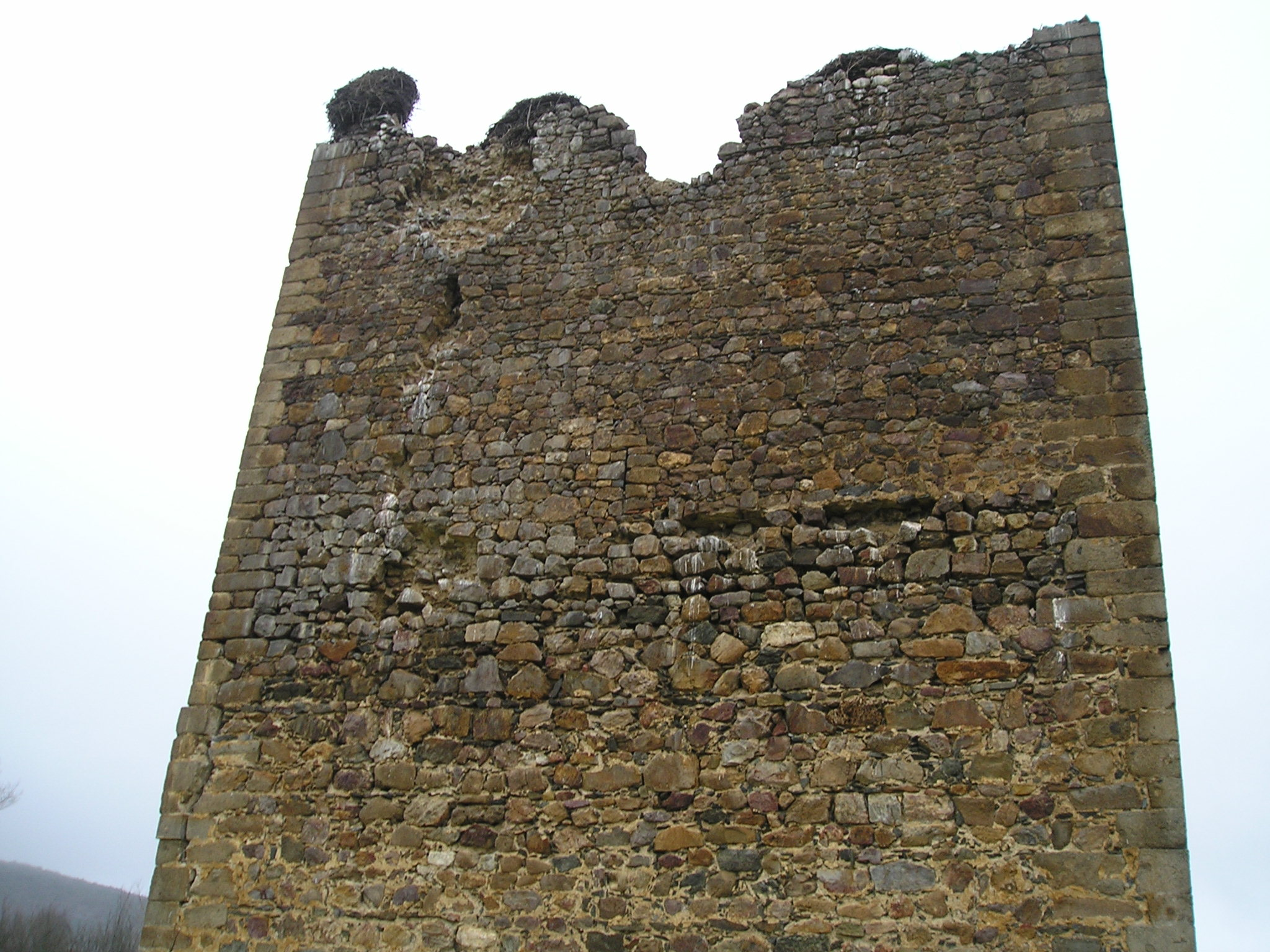 Daños del Torreón de Tamames